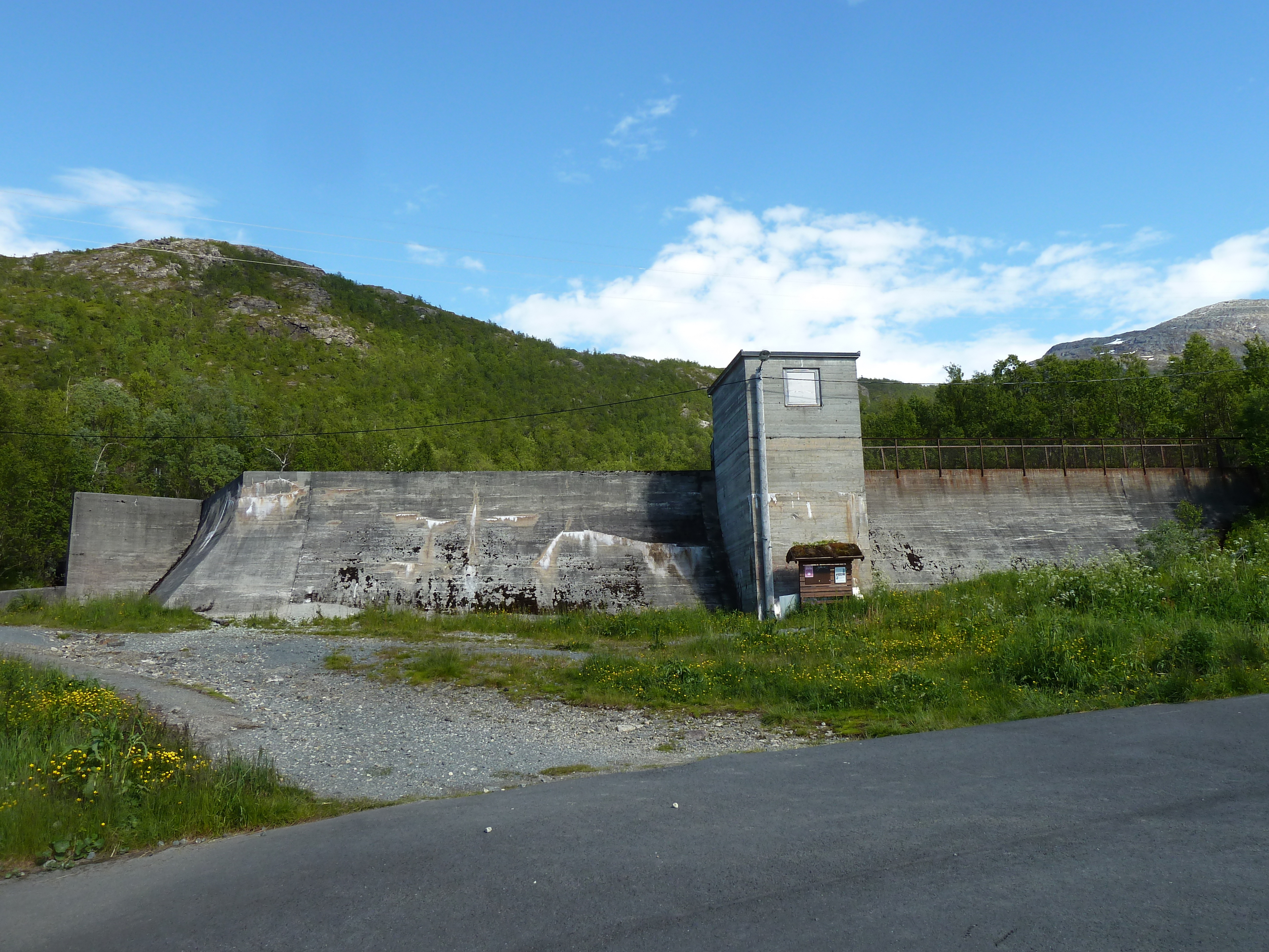 Taraldsvik kraftverk i Narvik. Vannreservoar for drikkevann.